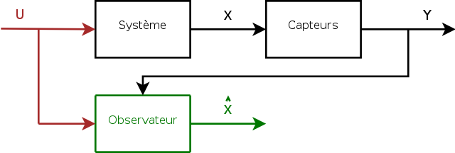 Schéma bloc pour illustrer l'article "Observateur d'état". Créée par François Poulain Fpolux, avec Dia, le 26 février 2007.